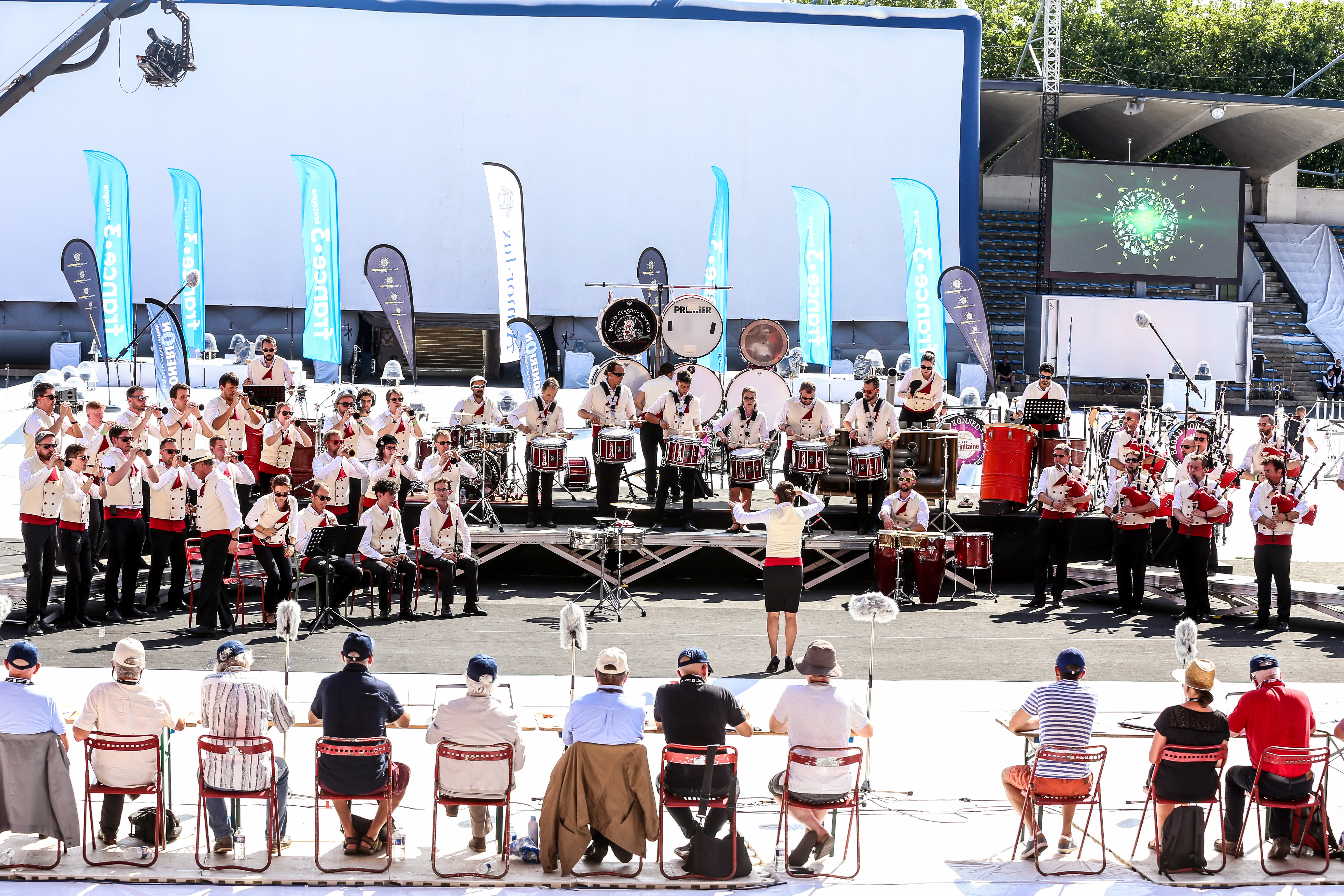 Épreuve d'été du Championnat national des bagadoù de Première catégorie organisée au stade du Moustoir dans le cadre du Festival Interceltique de Lorient en Bretagne le 4 août 2018.